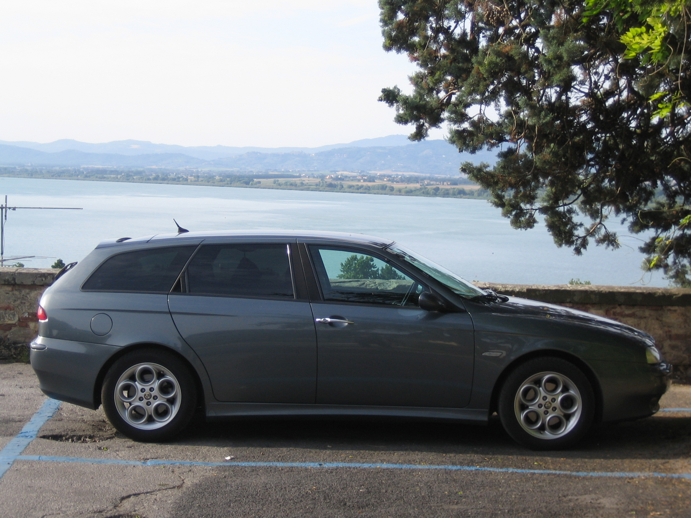 Alfa_156_Break_aus_Oesterreich_in_Italien